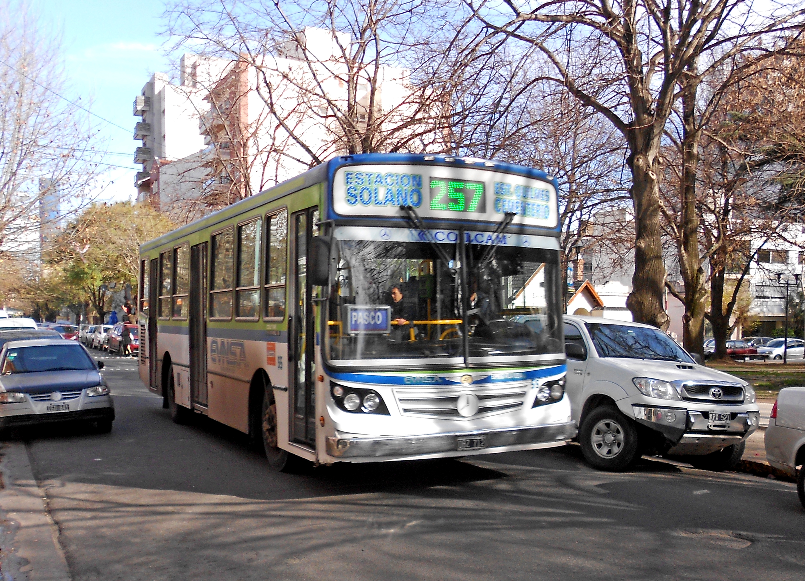 Interno de la línea 257 ramal Pasco, circulando por Quilmes Norte.